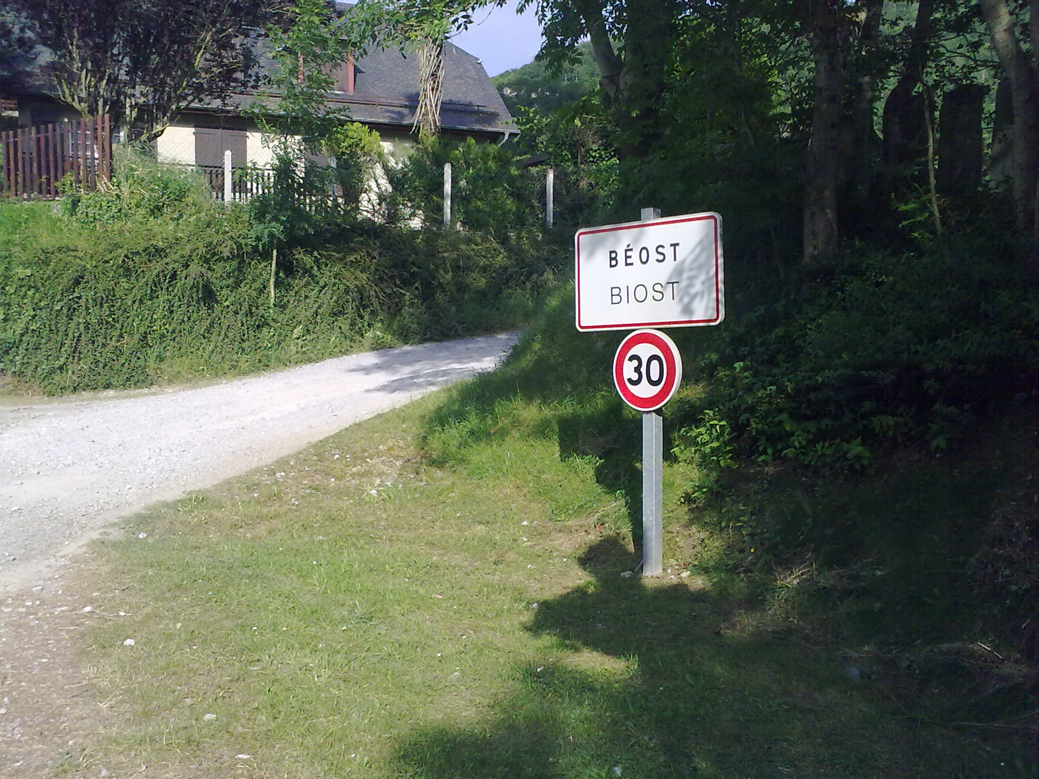 Entrée dans Béost (Pyrénées-Atlantiques, France).